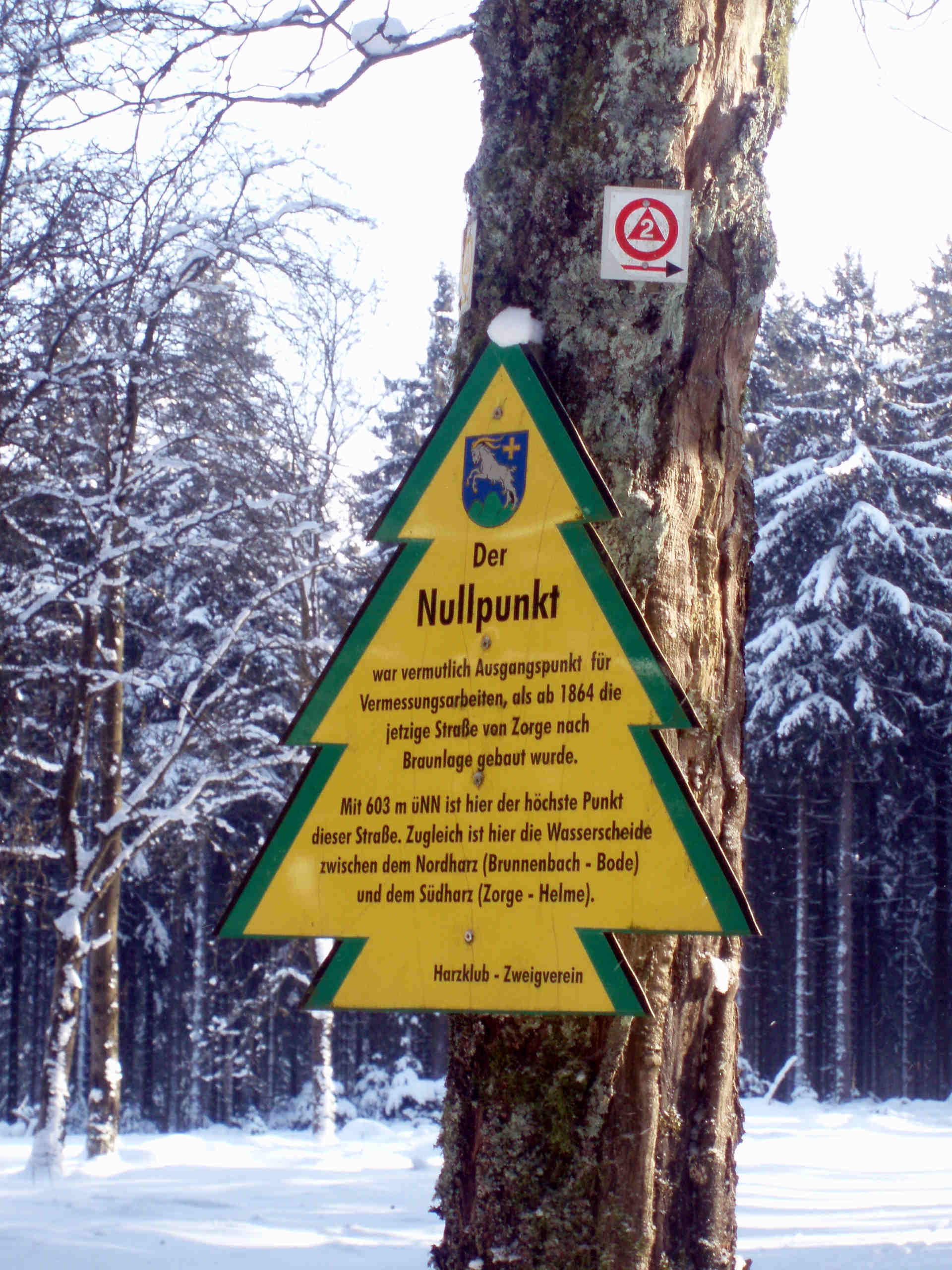 Der Nullpunkt